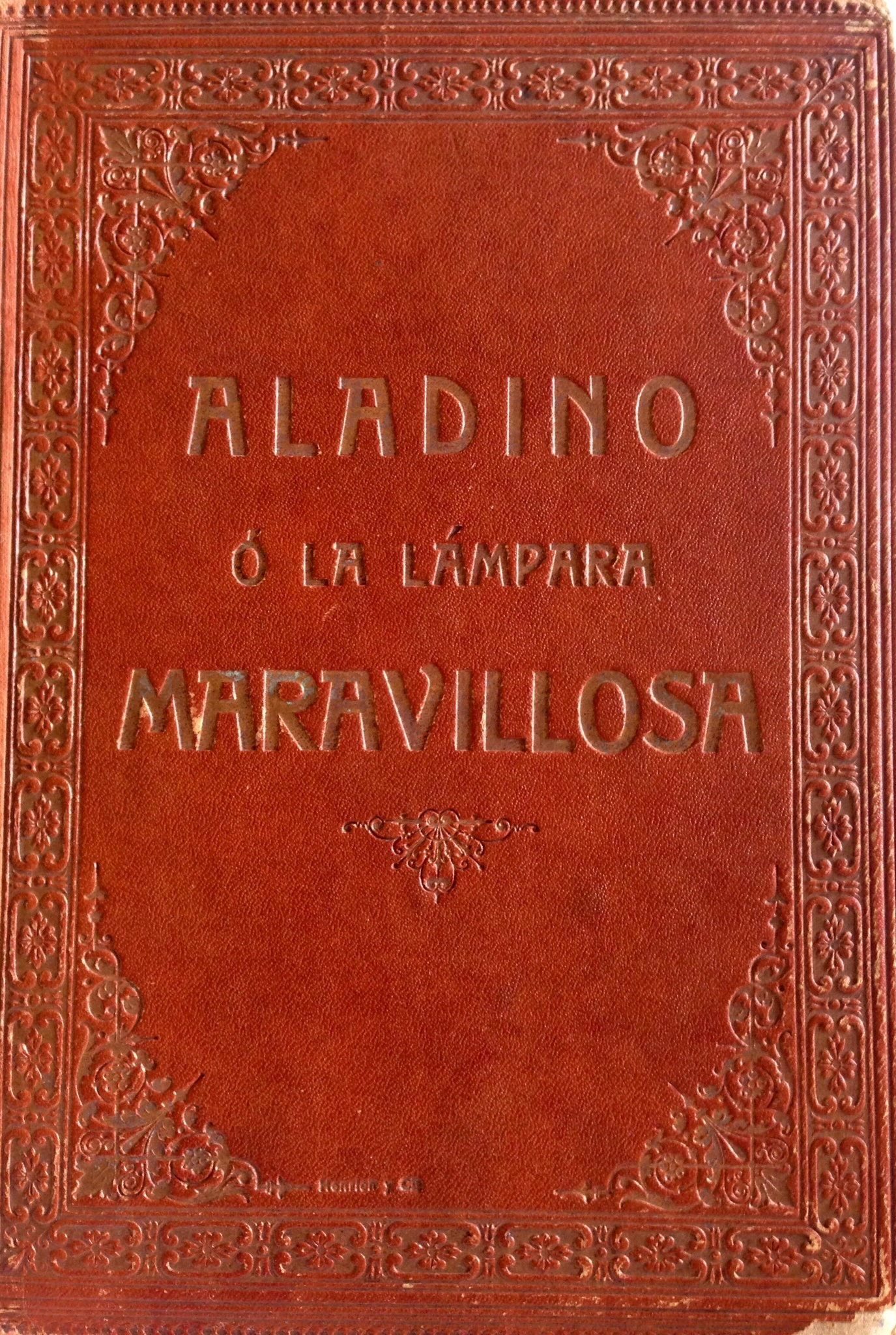 Aladino o Lámpara Maravillosa. Primera traducción al español por D. Pedro Umbert. Barcelona: 24 Enero 1910